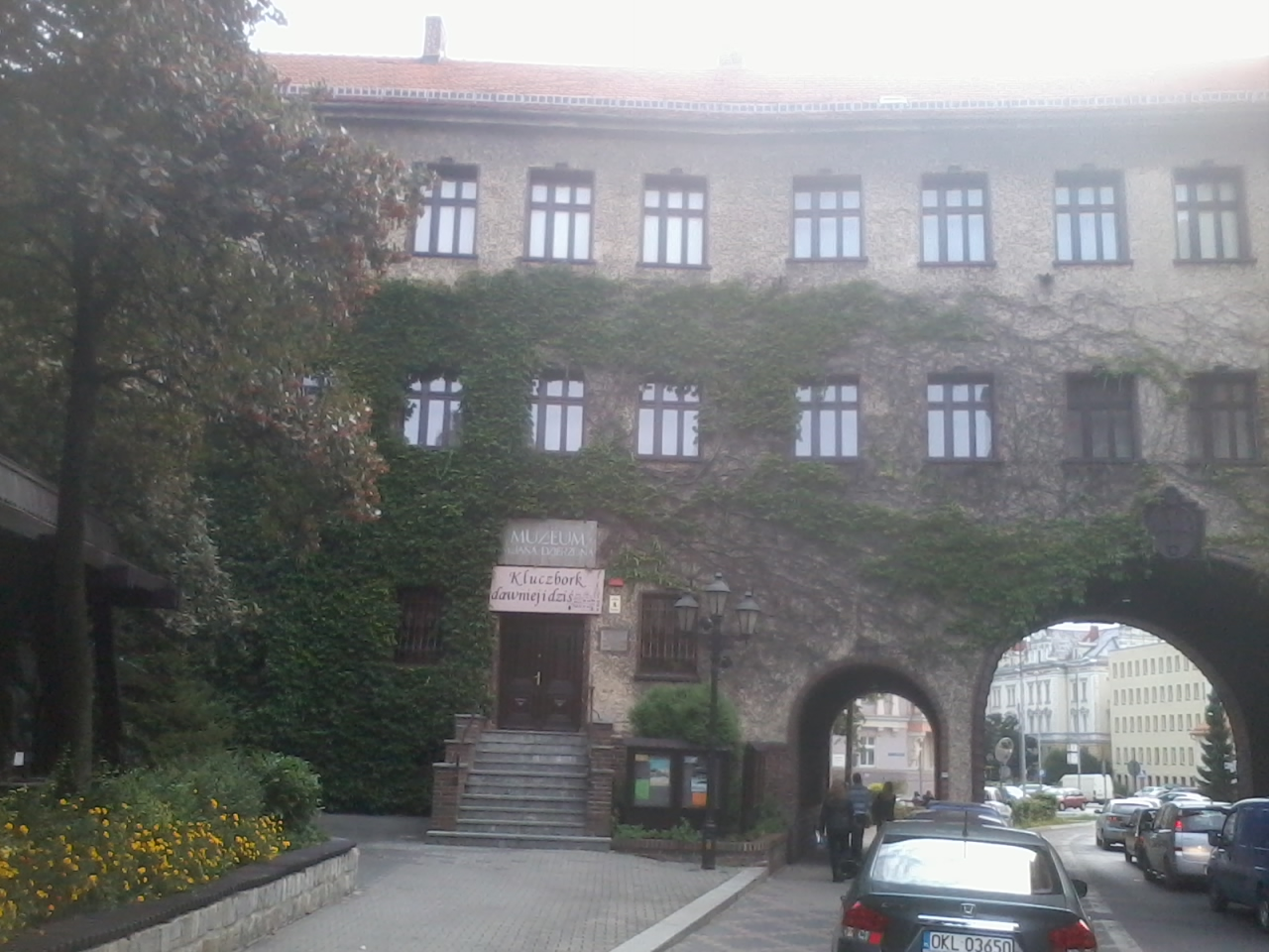 Kluczbork, budynek muzeum, 1931-1932